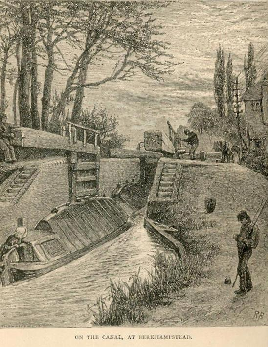 Canal en Angleterre, vers 1850 Source : English pictures drawn with pen and pencil By the Rev. Samuel Manning, LL.D., and the Rev. S. G. Green, D.D. London, The religious tract society Vers 1850